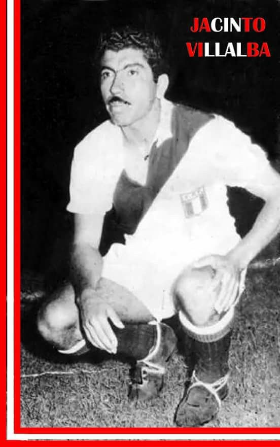 Jugador peruano y de sudamerica